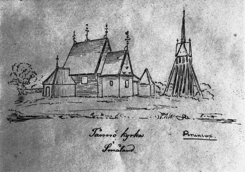 Tånnö rivna kyrka